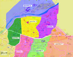 quariter